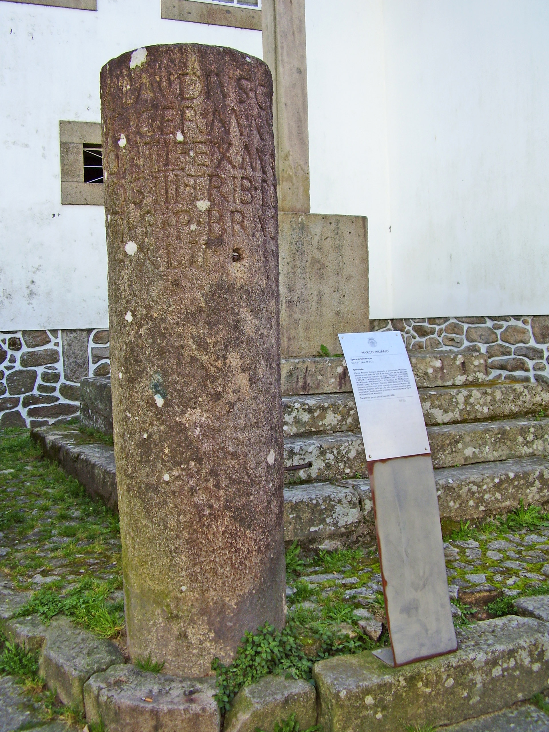 Miliario romano procedente de Lojas (portugal), correspondiente con CIL II 4875 = EE VIII 474: Ti(berius) Claudius Caesar/ Aug(ustus) Germanicus/ pontifex max(imus) imp(erator) V/ co(n)s(ul) III trib(unicia) potest(ate) / III p(ater) p(atriae) Braca[ra]/ XLII